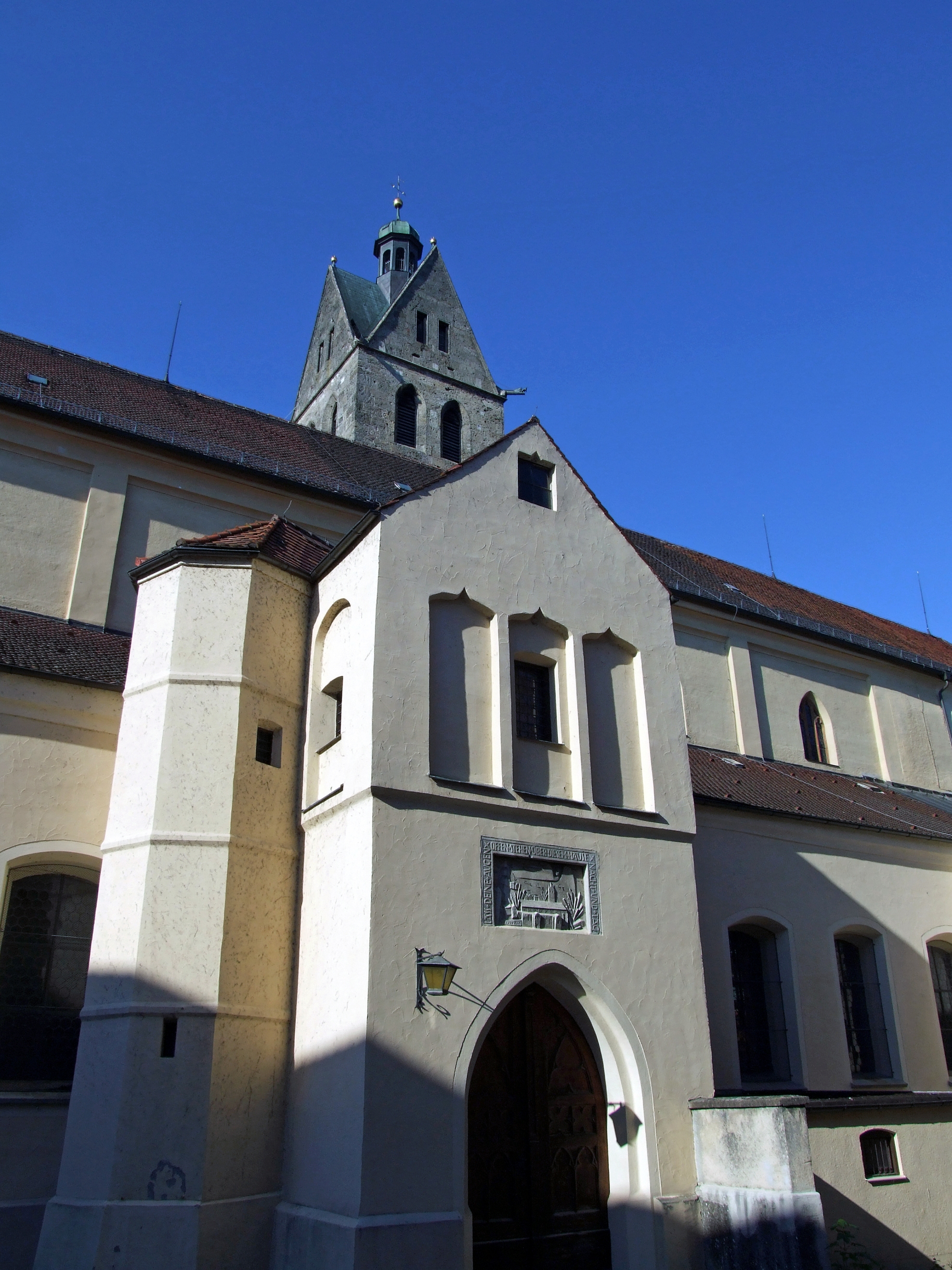 Unser Frauen in Memmingen von Süden